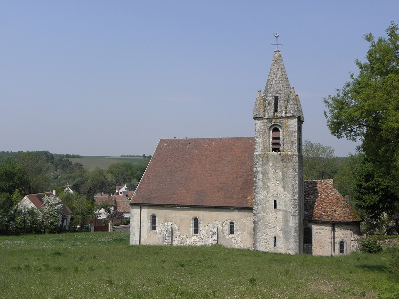 Église Saint-Martin de Puiselet-le-Marais (91).